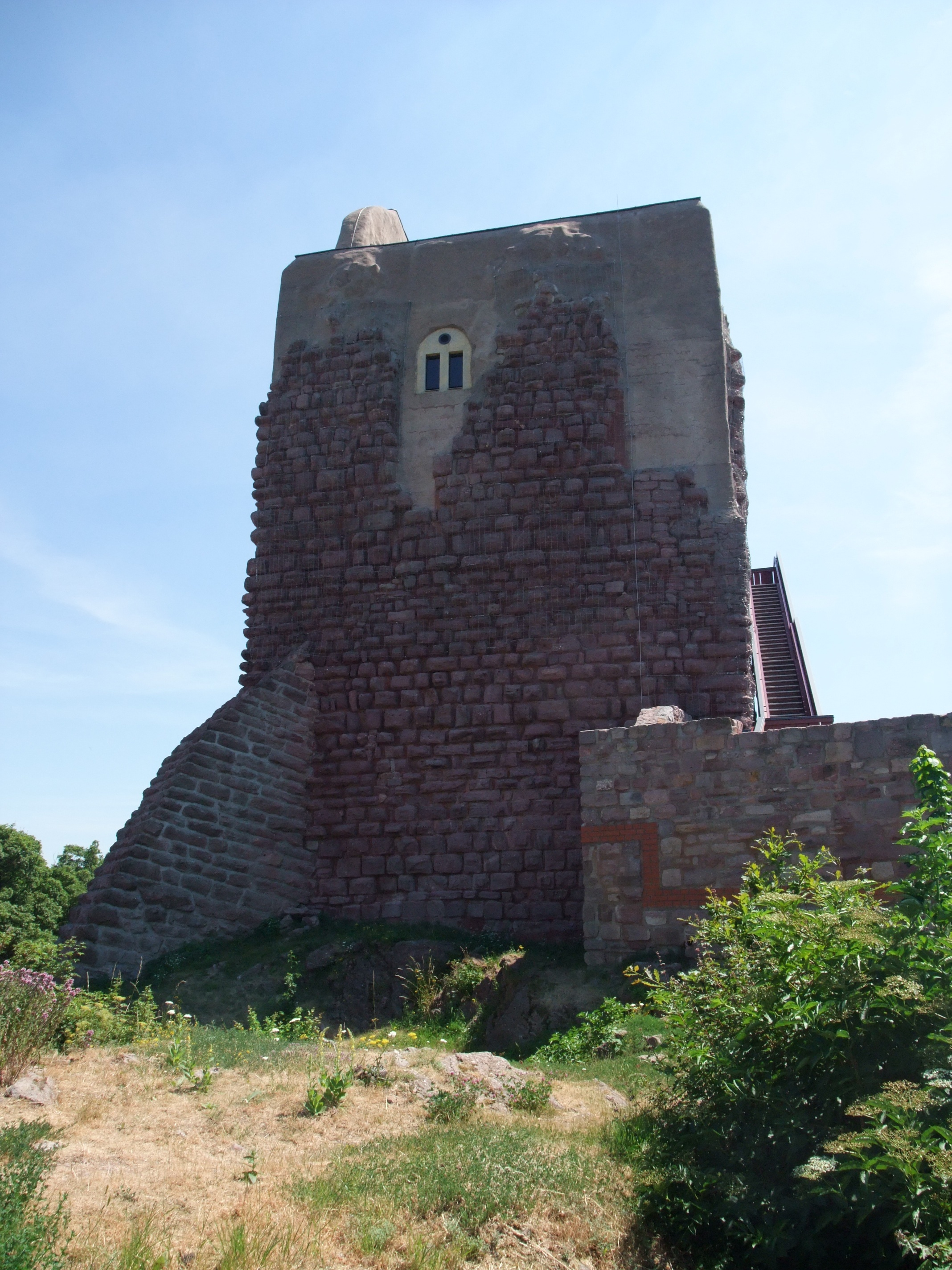 Barbarossaturm in der Oberburg der Reichsburg Kyffhausen in Deutschland.